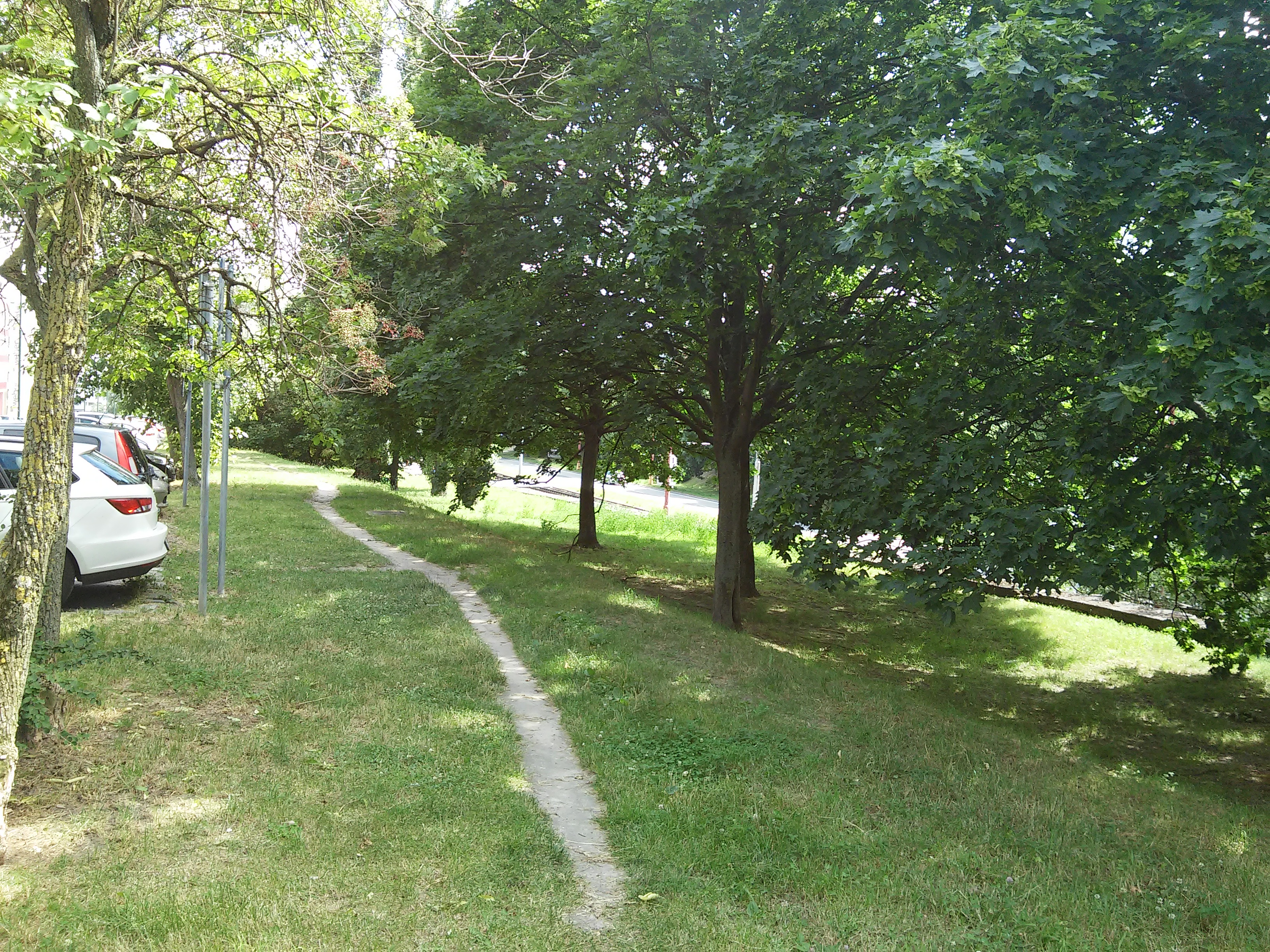 Púpavová, Dúbravka, Bratislava